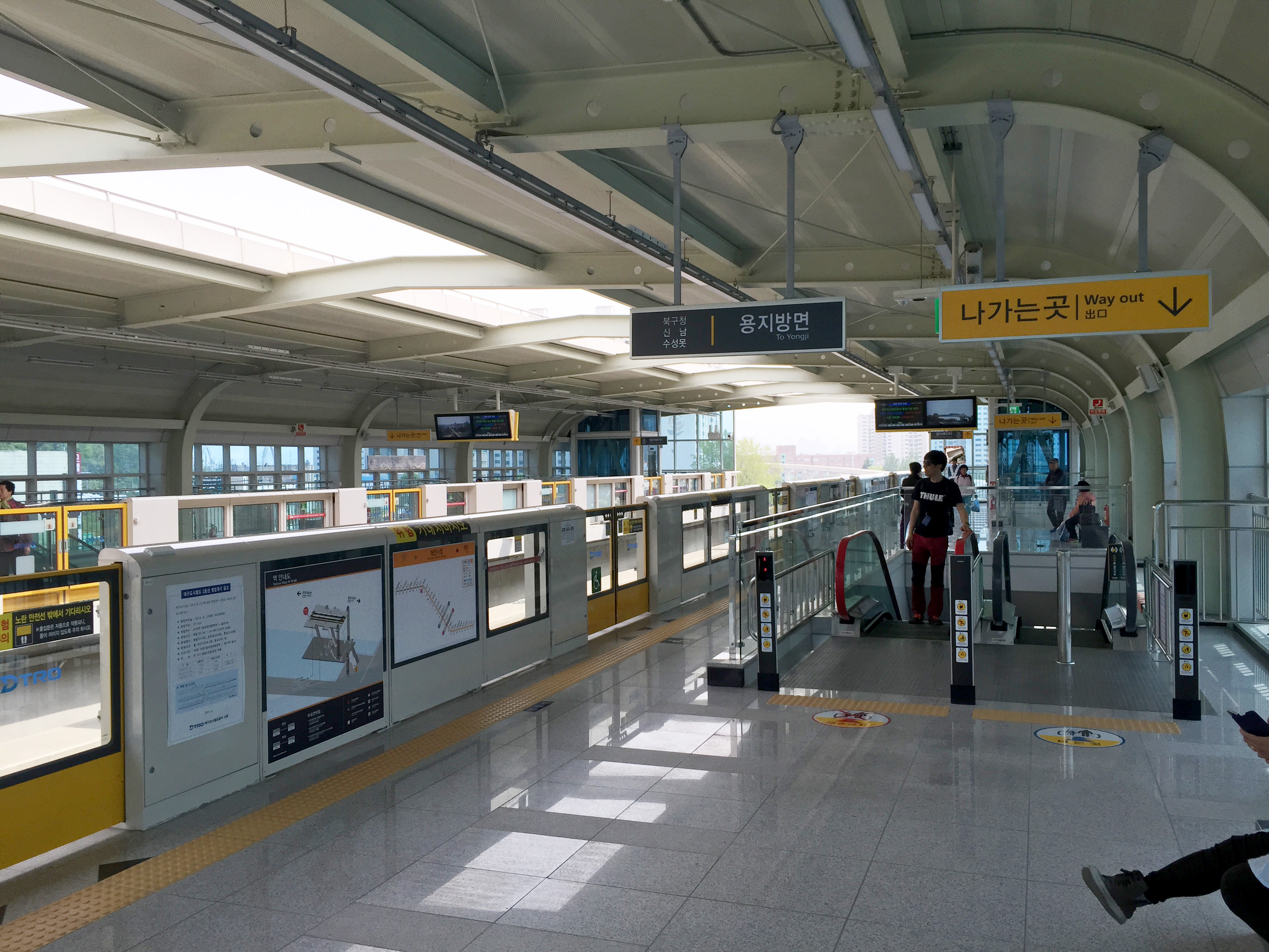 매천시장역 승강장